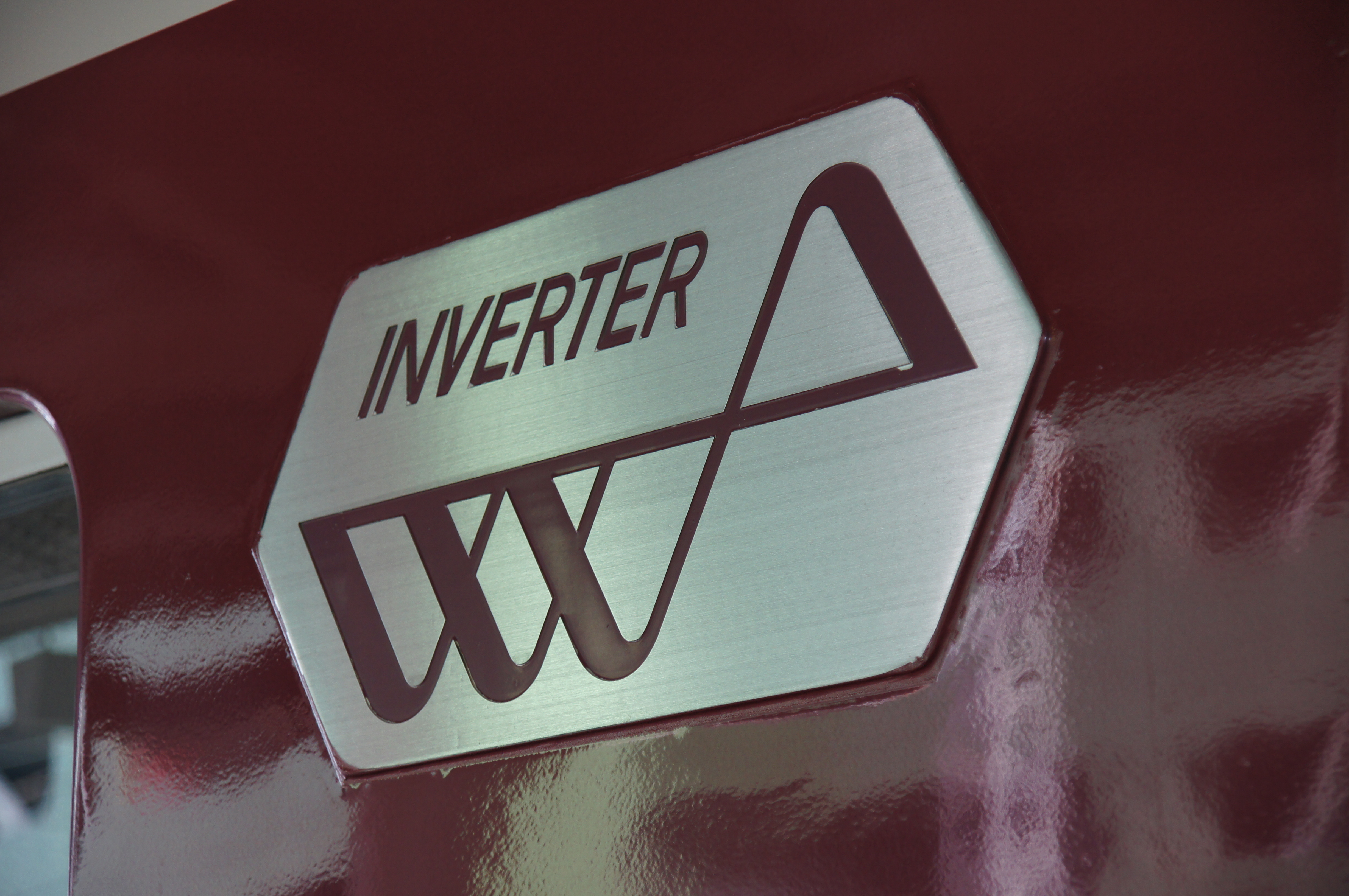 1420系の金属プレート式VVVFロゴ。